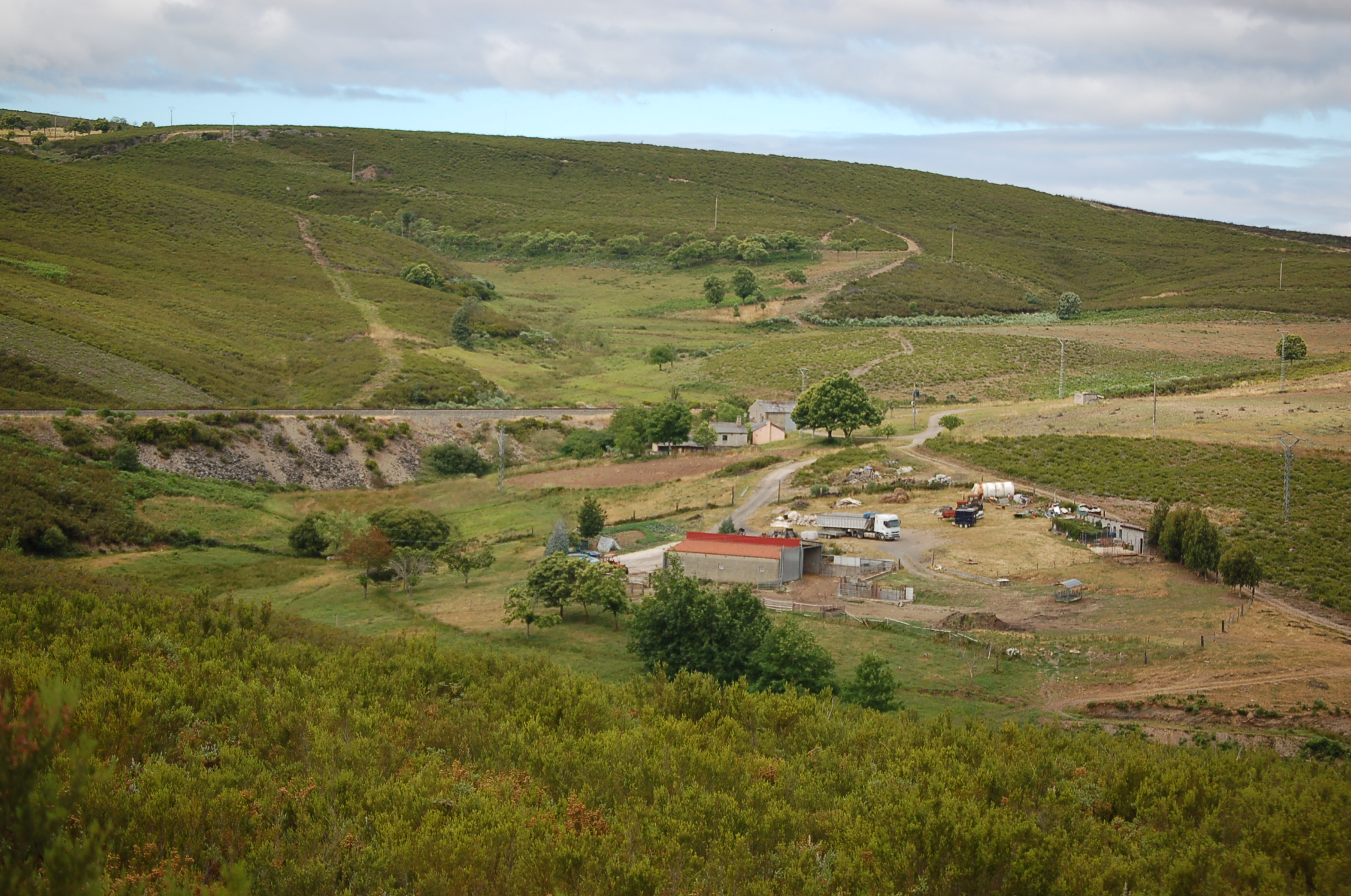 Vista da aldea de Campairos, en Carracedo da Serra, A Gudiña